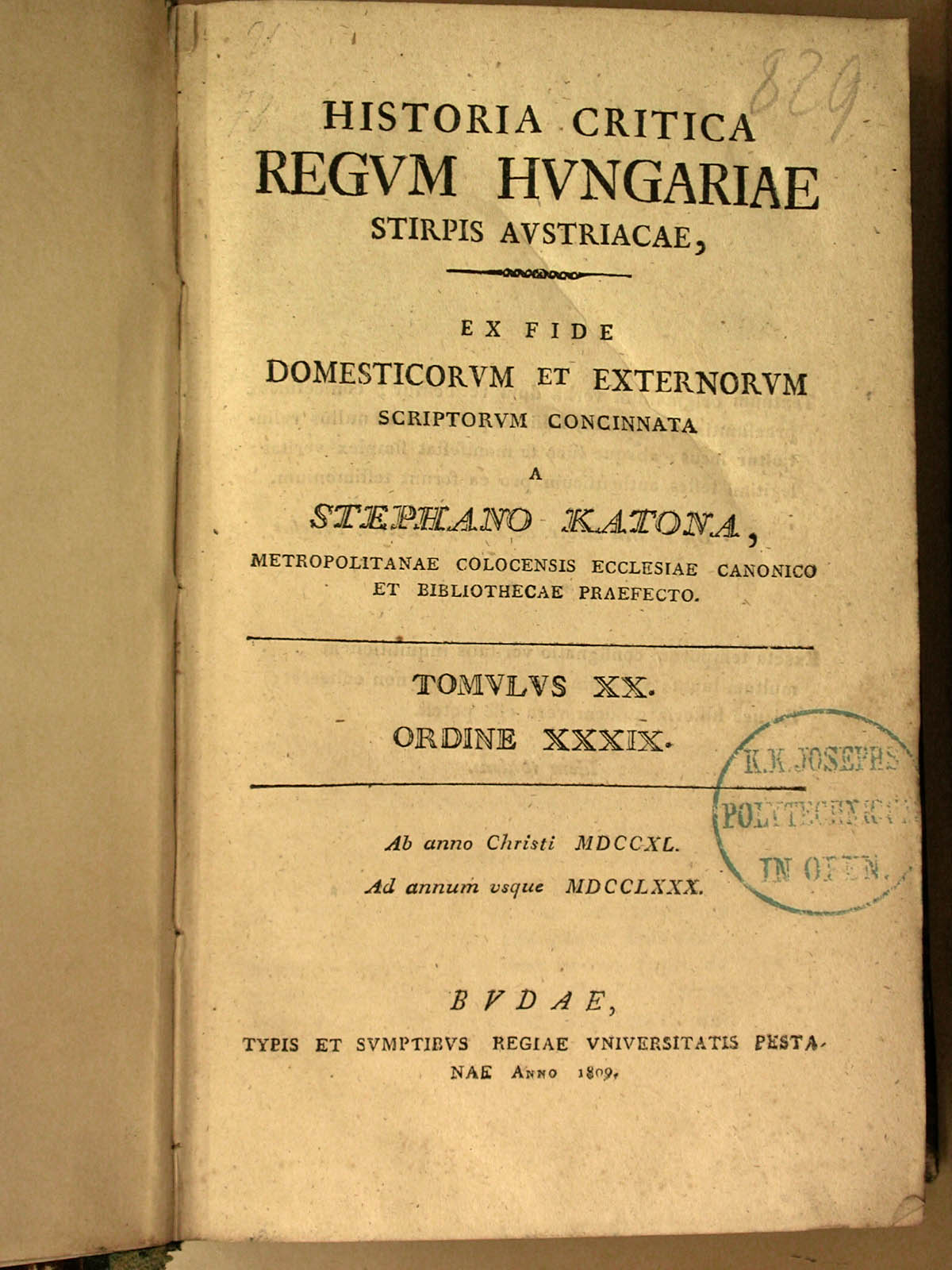 Katona István 42 kötetes műve (Historia Critica regni Hungariae) egyik kötetének címlapja.